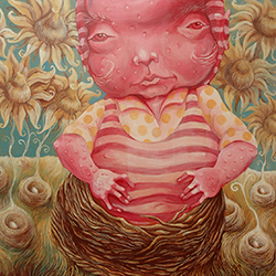 obraz 1x1m, rok 2006